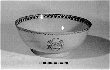 Bålskål, Ellsboporslin, Göteborgs stadsmuseum. Punschbål med fat, ur en större servis, beställd av Magnus Fredrik Åkerman som år 1790 blev ägare till Ellesbo herrgård i Rödbo socken, Bohuslän. Skålen är av ostindiskt vitt porslin med målad dekor. Utvändigt: draperibård i lila och guld runt kanten, sköld med namnet "Ellsbo" omgiven av små gula blommor och gröna blad. Invändigt: bladranka i guld och grönt runt kanten.